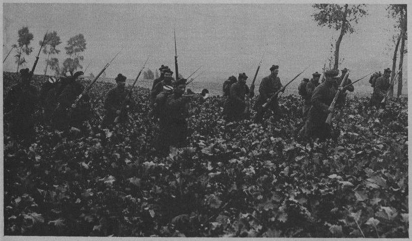 Légende de la photographie : les "Mathurins" chargeant à la baïonnette dans le Nord, ... Personne n'avait oublié l'héroïsme des fusiliers marins en 1870 et l'on attendanit avec confiance le jour où leur brigade monterait au feu. Ces braves se sont illustrés dès leur première rencontre avec l'ennemi...